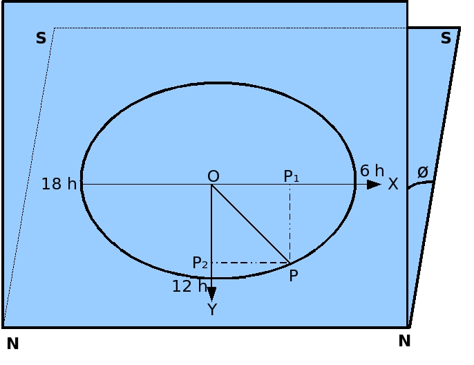 RPLl2006